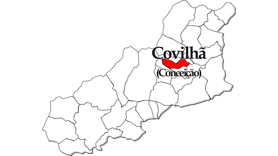 População